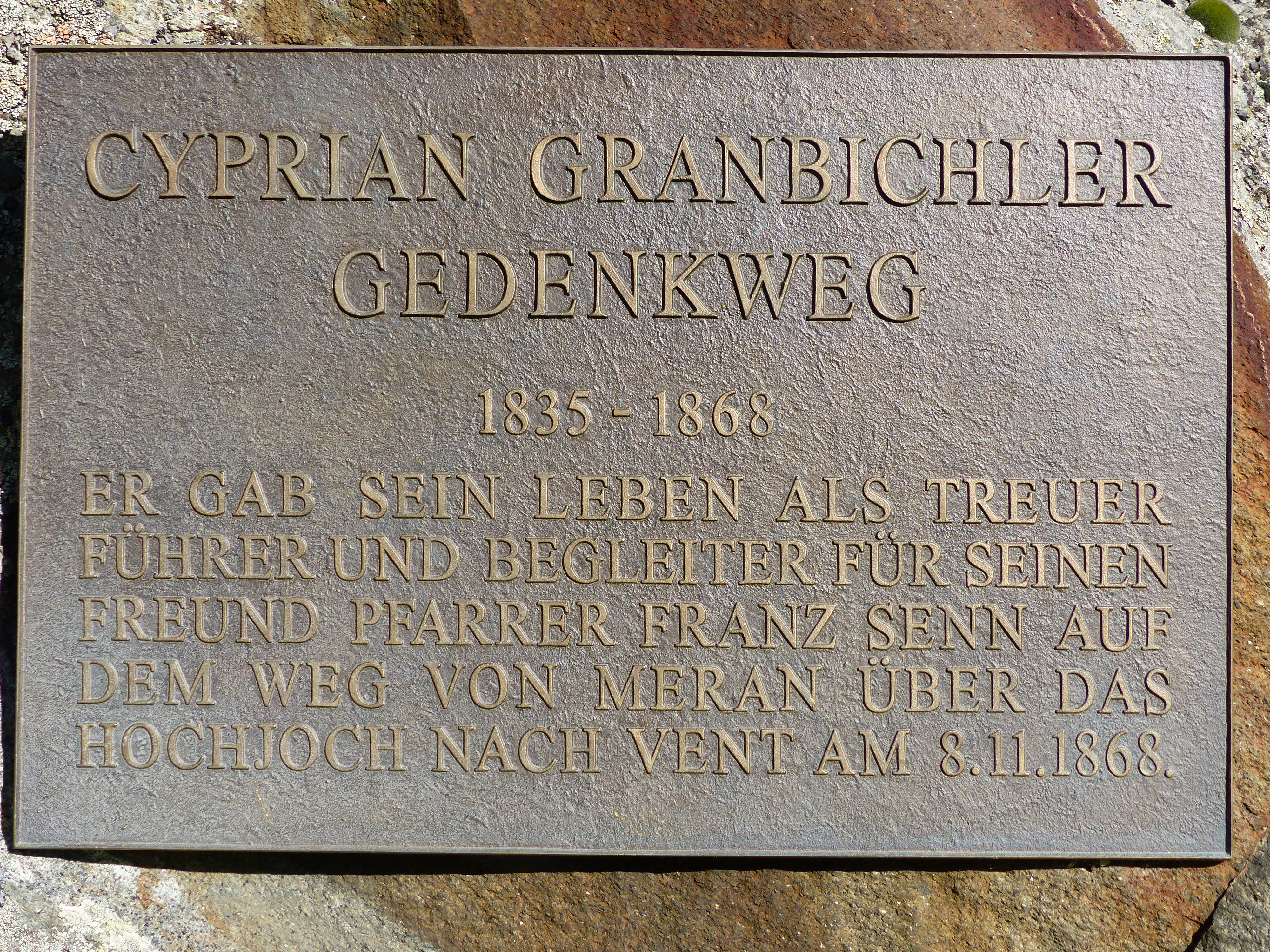 Gedenkplakette für Cyprian Granbichler am nach ihm benannten Weg durch das Rofental